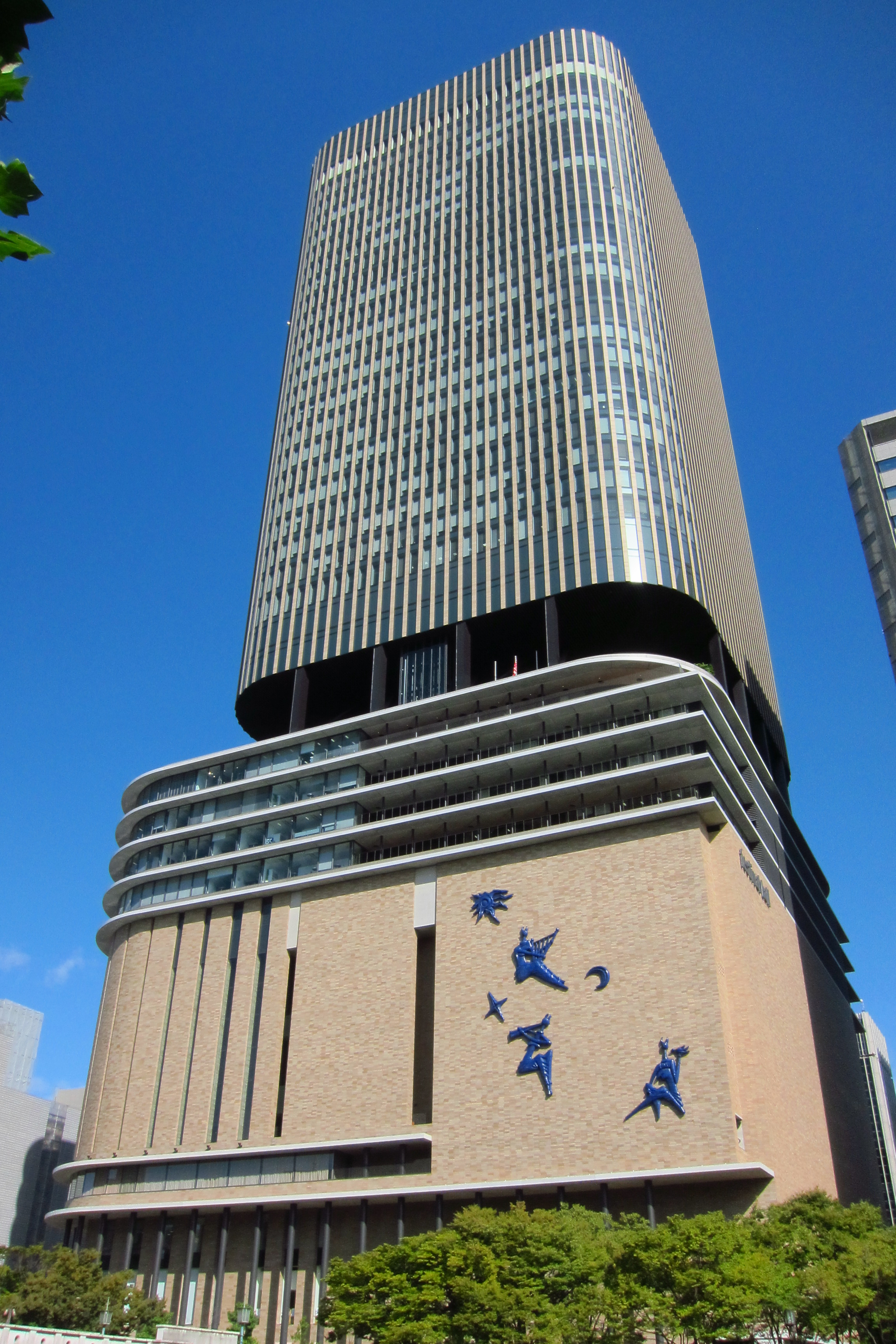 Nakanoshima Festival Tower (中之島フェスティバルタワー), Osaka, Osaka prefecture, Japan